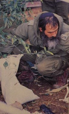 איש הרבנות הצבאית עוסק באיתור חלקי גופות באתר התרסקות היסעורים באסון המסוקים